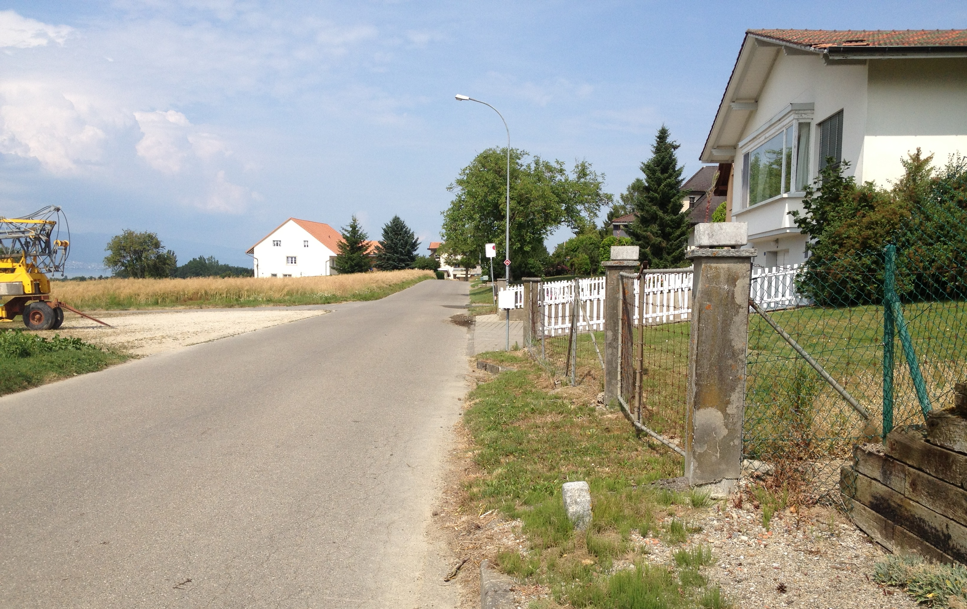 Le village de Forel dans la commune fribourgeoise de Vernay en Suisse.